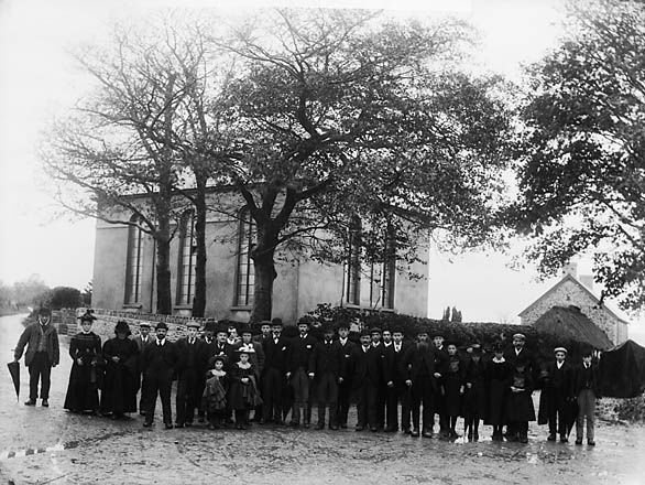 Teitl Cymraeg/Welsh title: Aelodau Capel Pantydefaid (U), Llandysul (Cer) Ffotograffydd/Photographer: John Thomas (1838-1905) Dyddiad/Date: [ca. 1885] Cyfrwng/Medium: Negydd gwydr / Glass negative Maint/Dimensions: 16.5 x 21.5 cm. Cyfeiriad/Reference: jth00954 Rhif cofnod / Record no.: 3361905 Rhagor o wybodaeth am gasgliad John Thomas yn Llyfrgell Genedlaethol Cymru More information about the John Thomas Collection at the National Library of Wales Mae ffotograffau John Thomas hefyd yn rhan o Broject Europeana Libraries John Thomas' photographs also form part of the Europeana Libraries Project